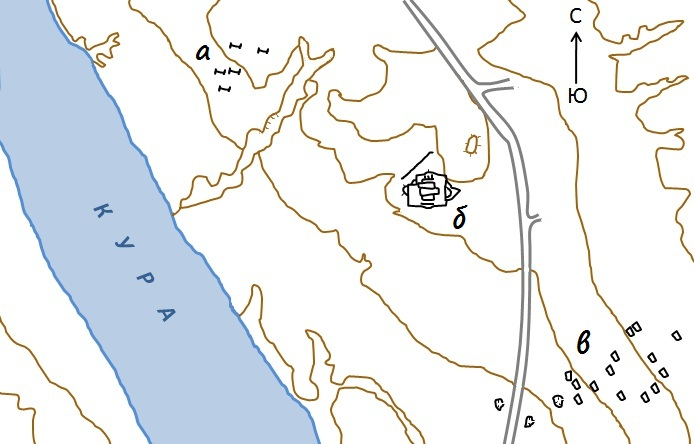 Схематическая карта городища Судагылан.